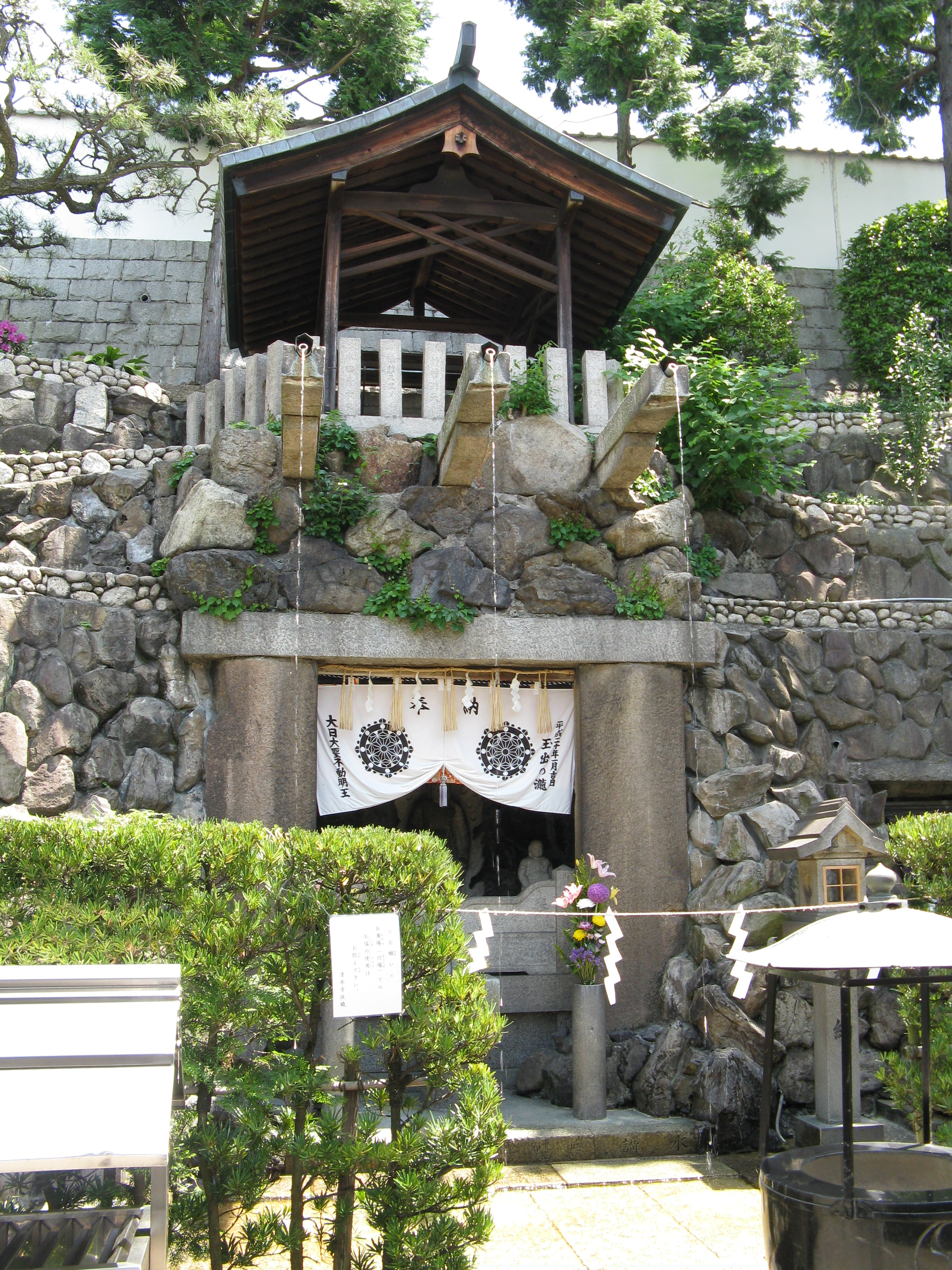 清水寺 玉出の滝